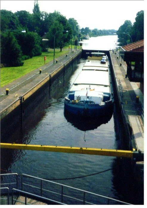 Slüüs in'n Küstenkanal bi Ollnborg